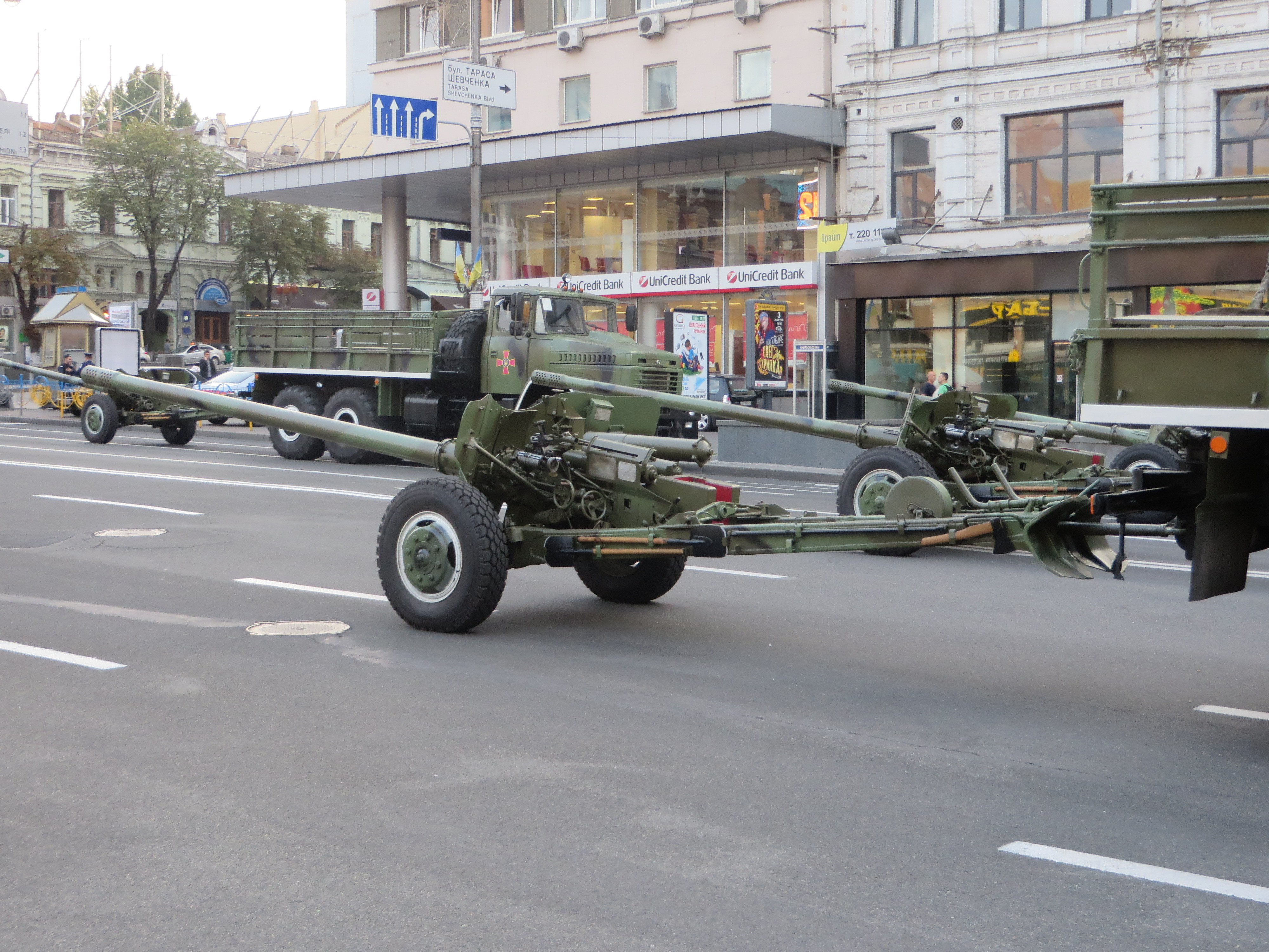 Гармата на Хрещатику під час тренувального маршу 22 серпня 2014